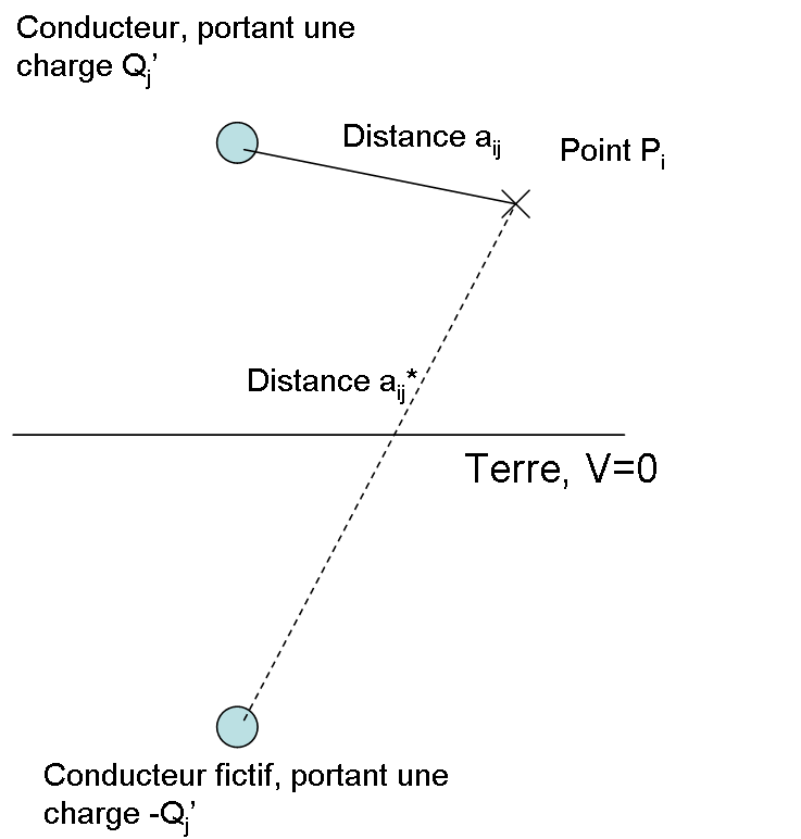 Schéma illustrant le calcul d'un potentiel dans le cas d'une application de la méthode des miroirs